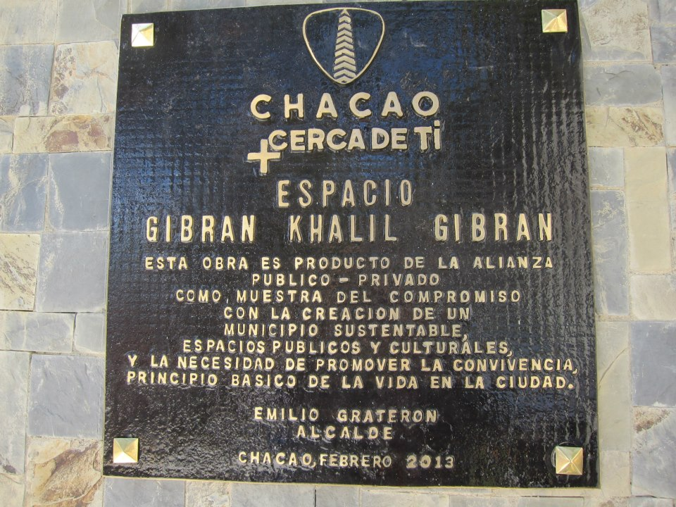 Espacio Gibrán Khalil Gibrán. Esta obra es producto de la alianza Público - Privado como, muestra del compromiso con la creación de un municipio sustentable, espacios públicos y culturales, y la necesidad de promover la convivencia, principio básico de la vida en la ciudad. Emilio Graterón. Alcalde Chacao, Febrero 2013